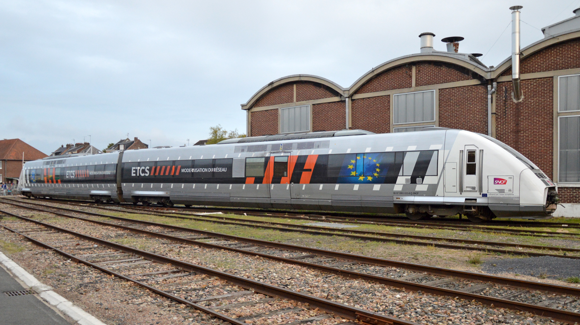 Matériel automoteur de l'Infra, X 72633/34 ETCS (European Train Control System) lors de la fête du rail au dépôt de Longueau.